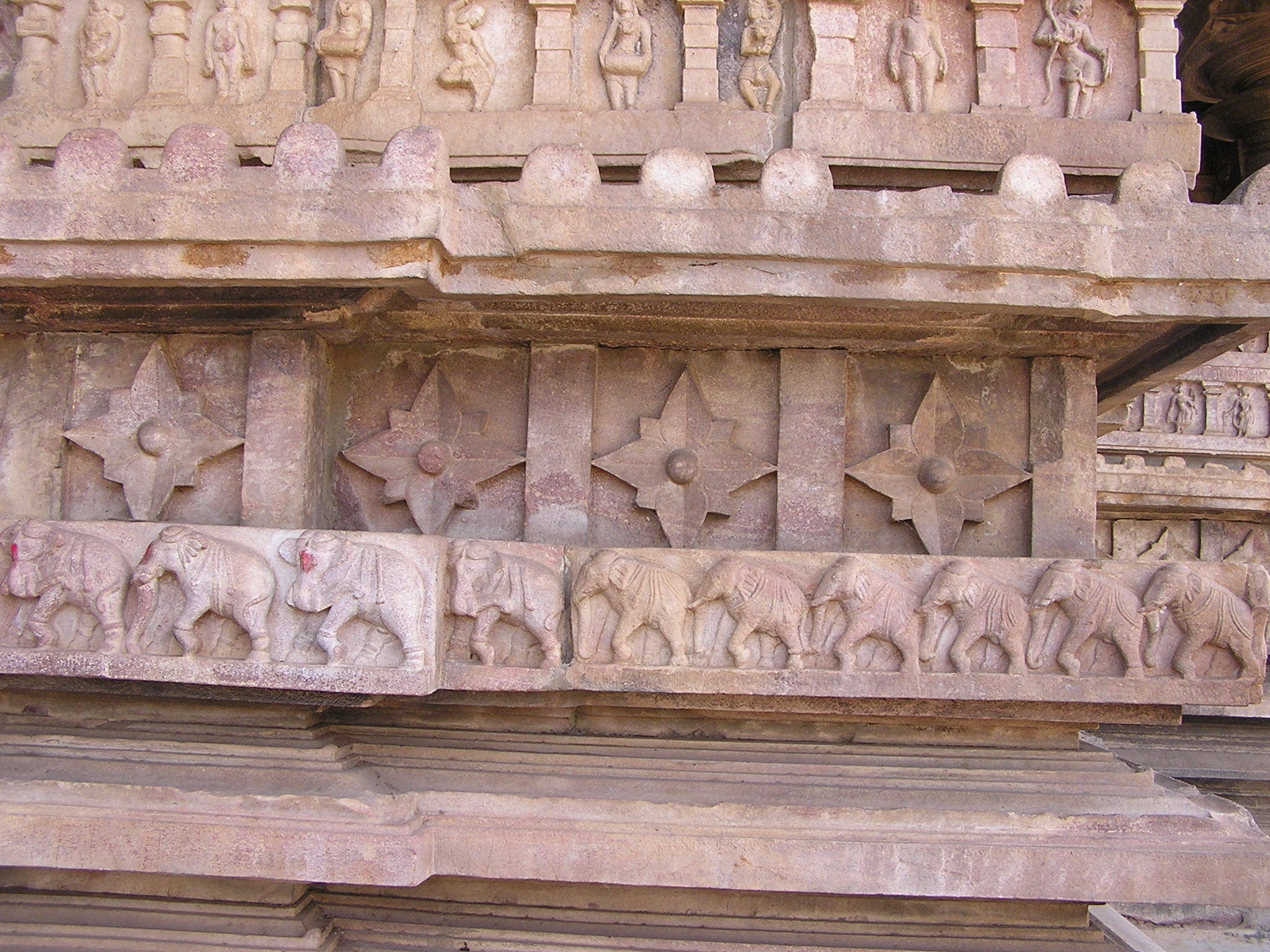 Ramappa temple elephants GPS: 18.259167, 79.943333